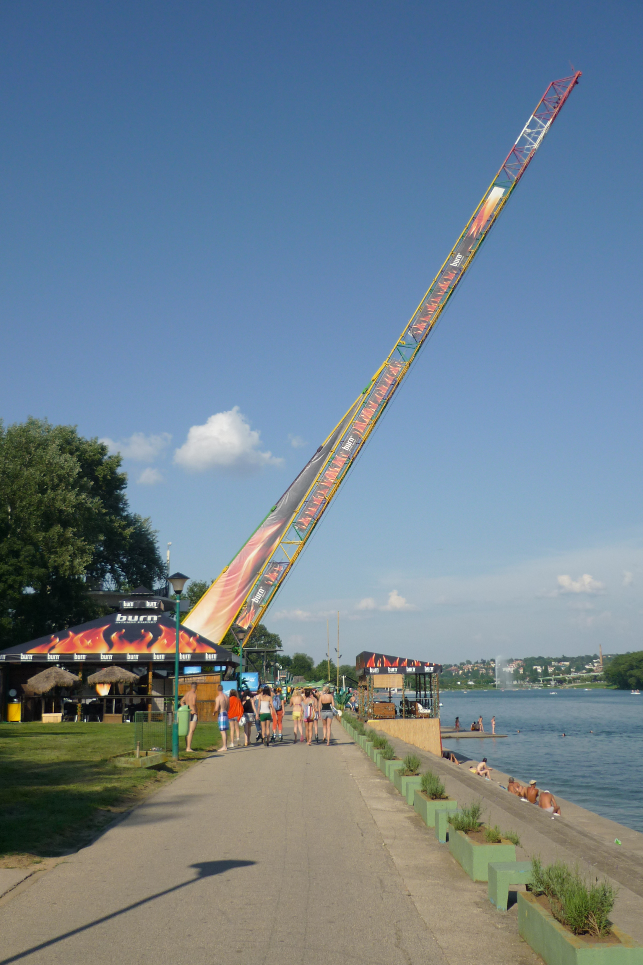 Bungee jumping auf der Ada Ciganlija